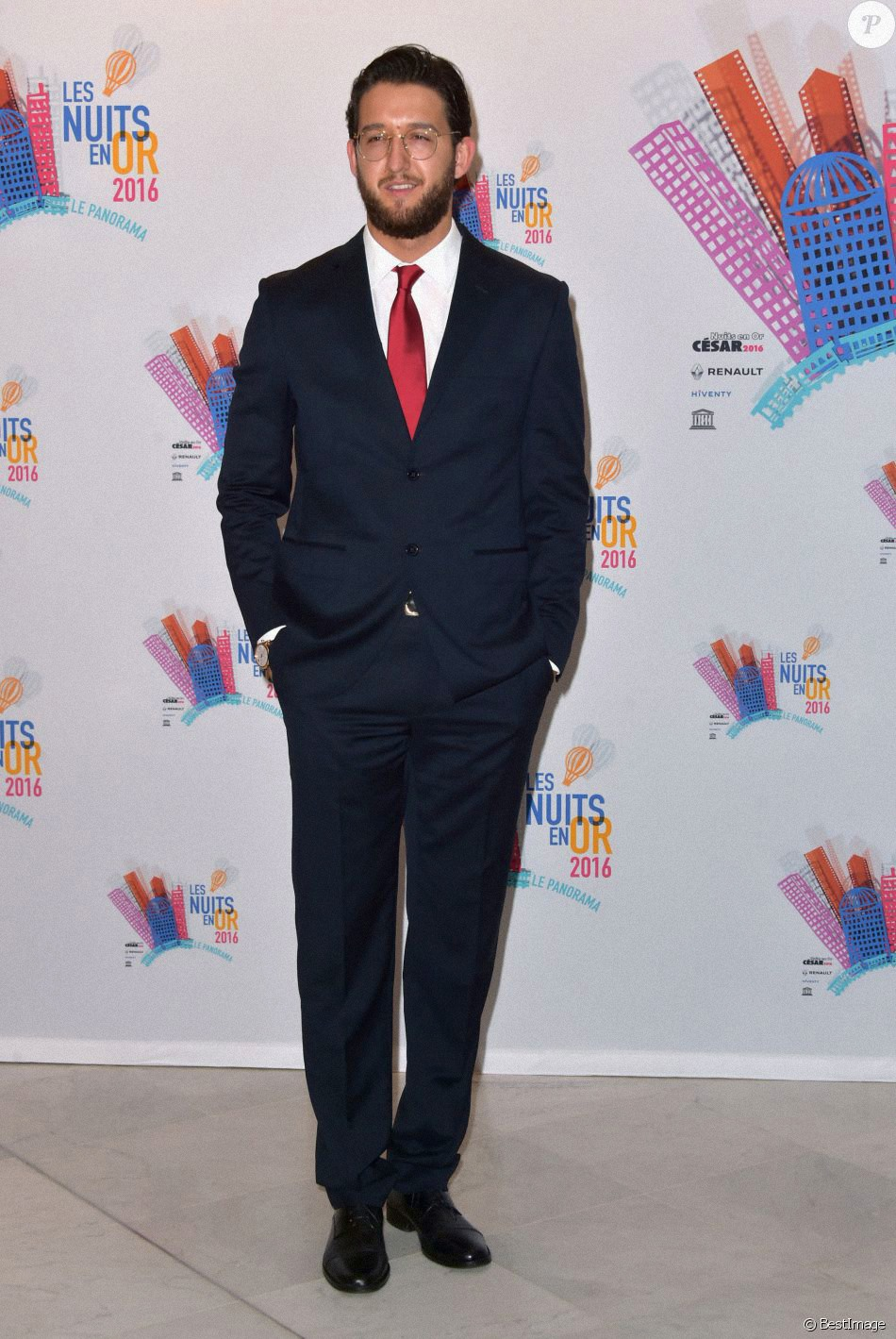 Giuseppe Marco Albano